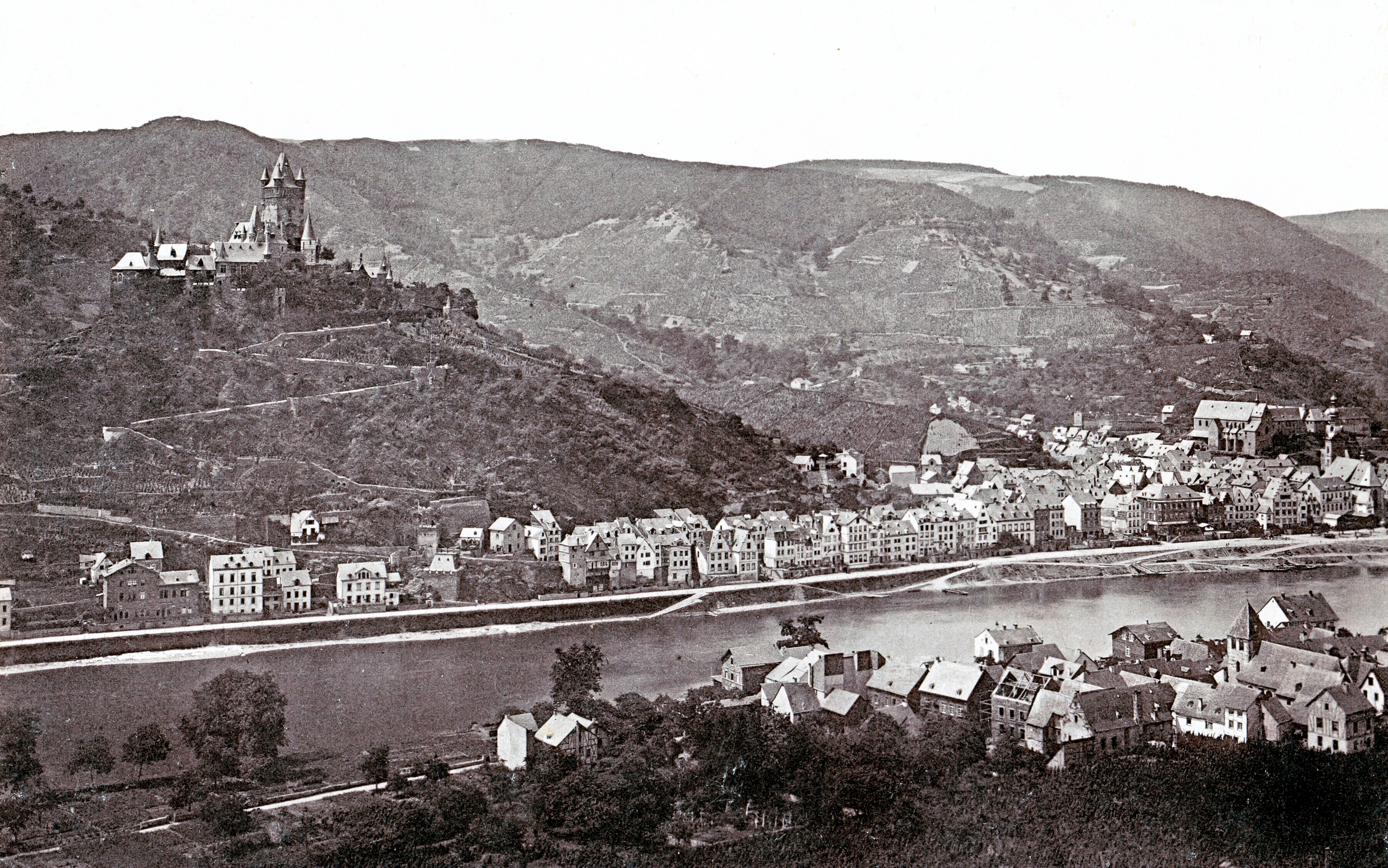 Cochem mit Reichsburg, im Vordergrund Cond